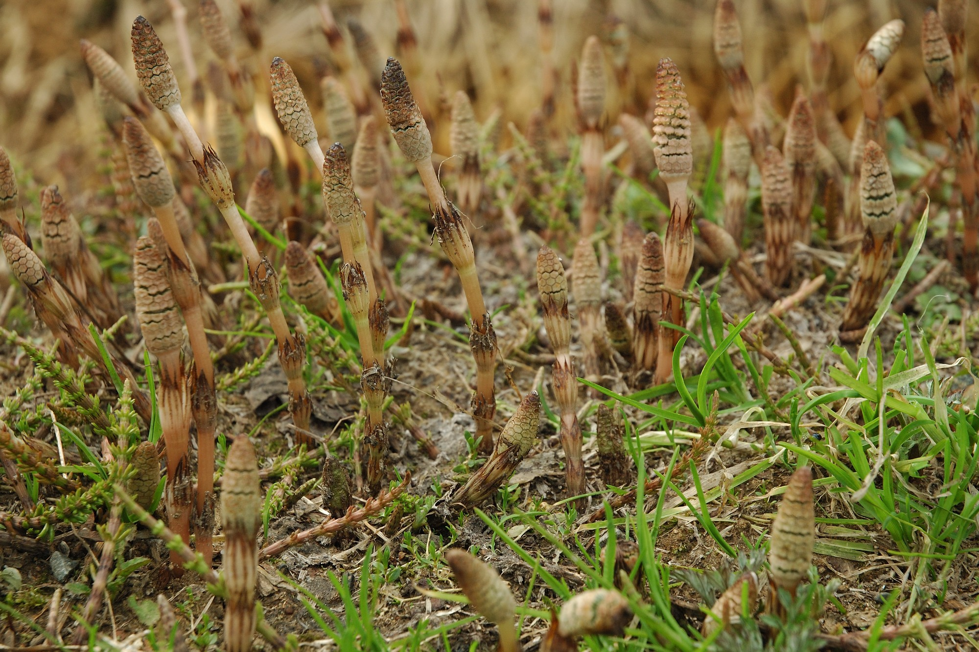 Equisetum arvense (Horse tail,スギナの胞子茎ja:ツクシ)